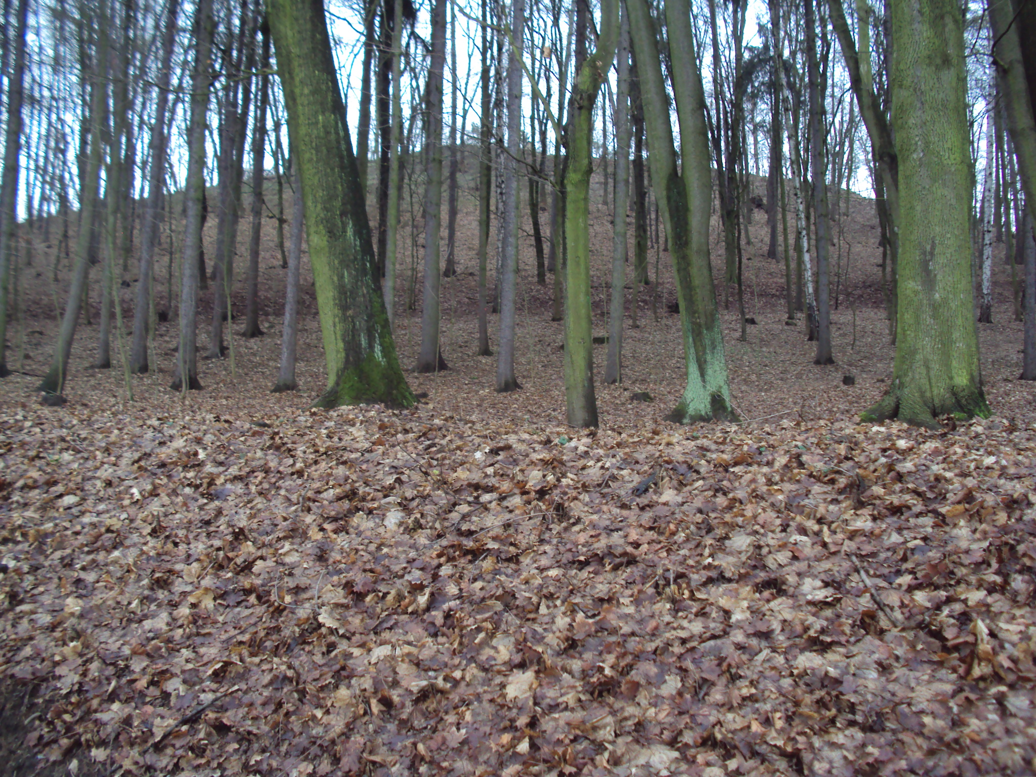 Česky: Holý vrch je kopeček v České Lípě